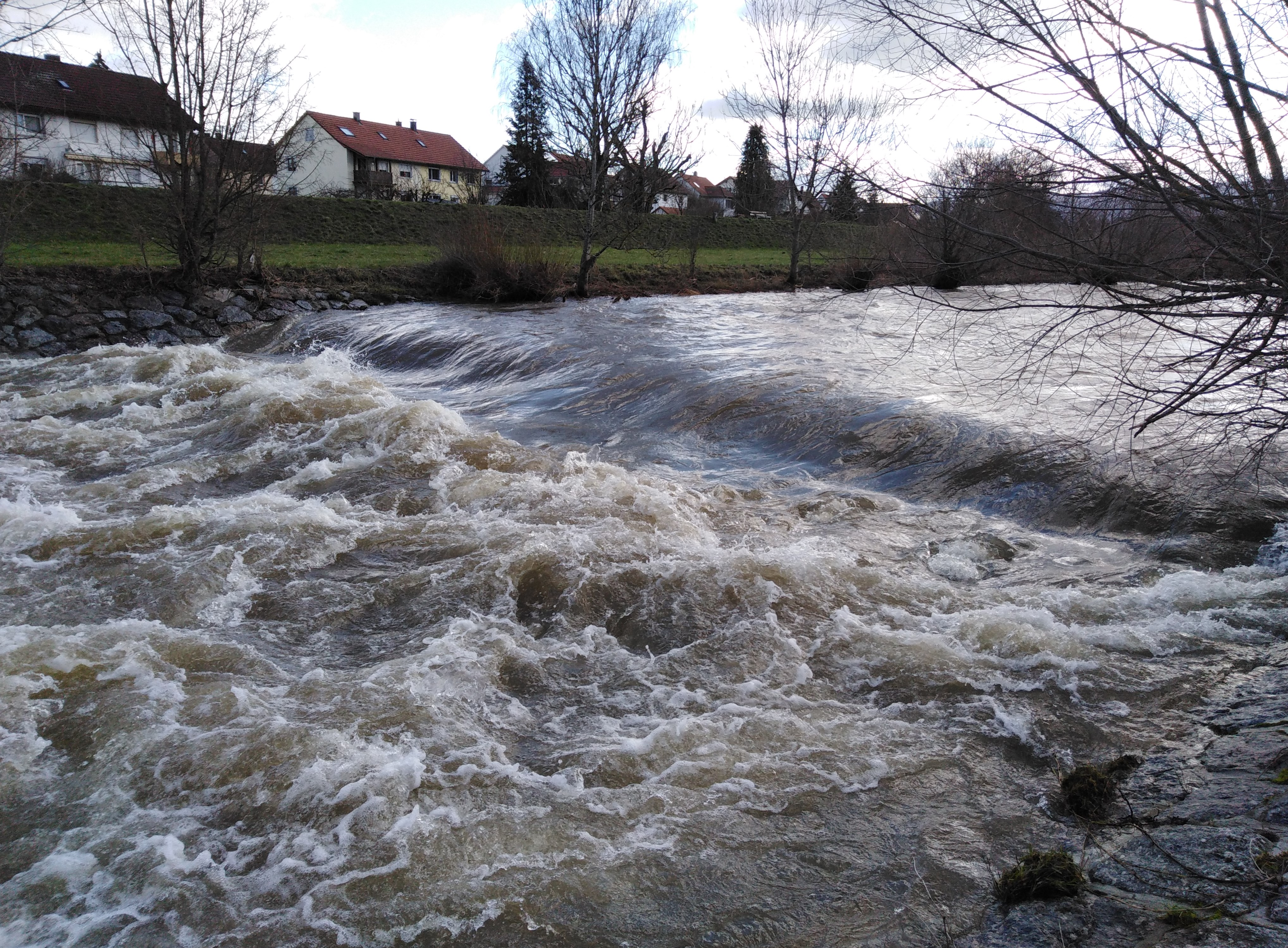 Lauchringen, Gemeinde im Landkreis Waldshut in Baden Württemberg. Die Wutach bei Unterlauchringen. Erhöhter Pegel im Frühjahr 2019.